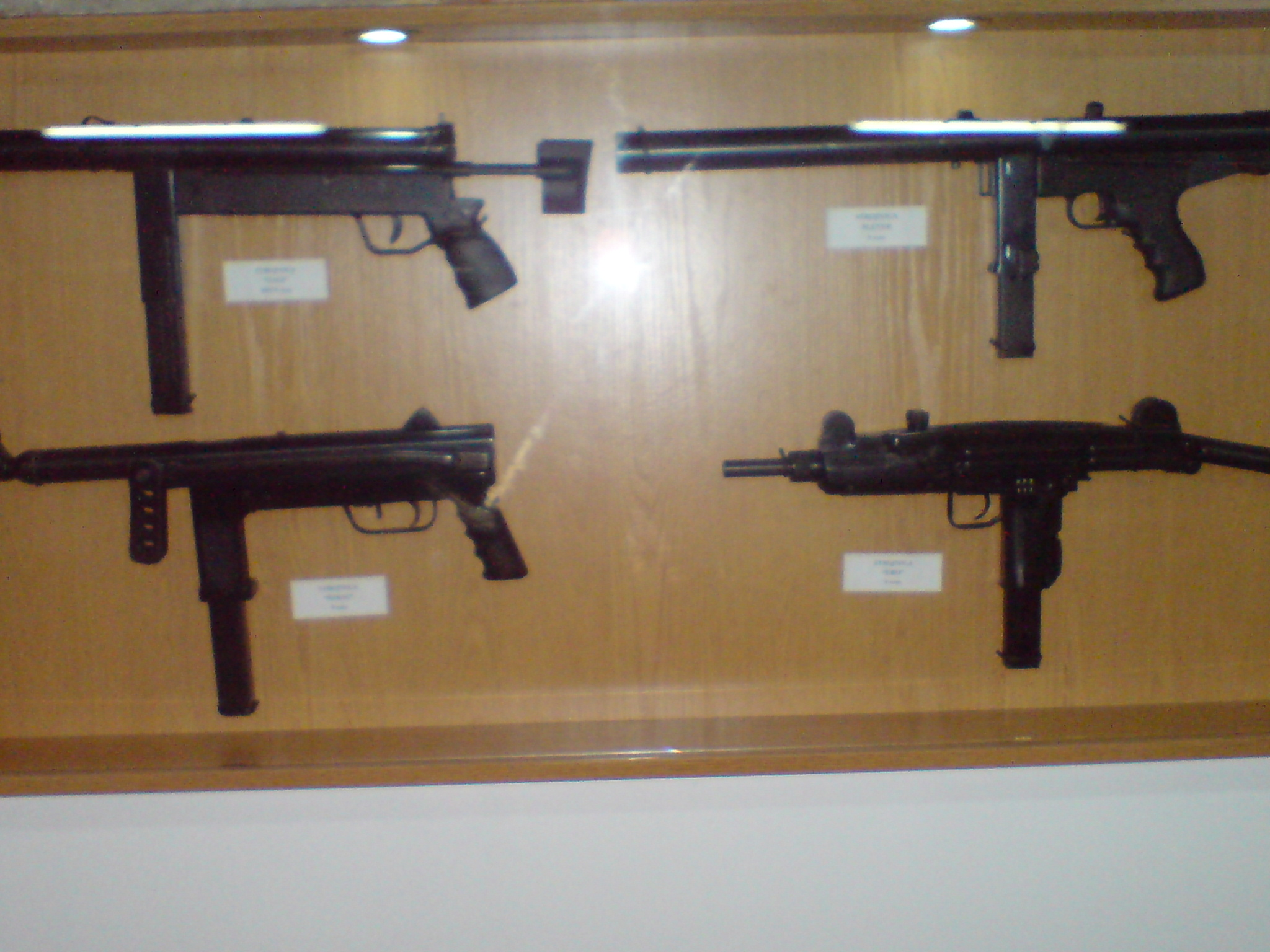 Vukovarska vojarna